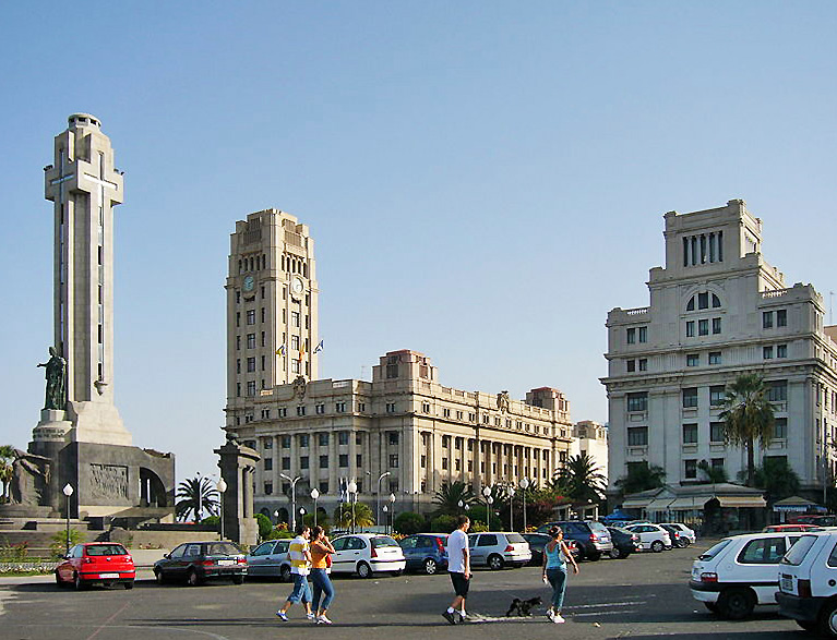 Vista del Palacio Insular Santa Cruz de Tenerife, Tenerife, Canary Islands, Spain September 2005 Olaf A. Koch own picture